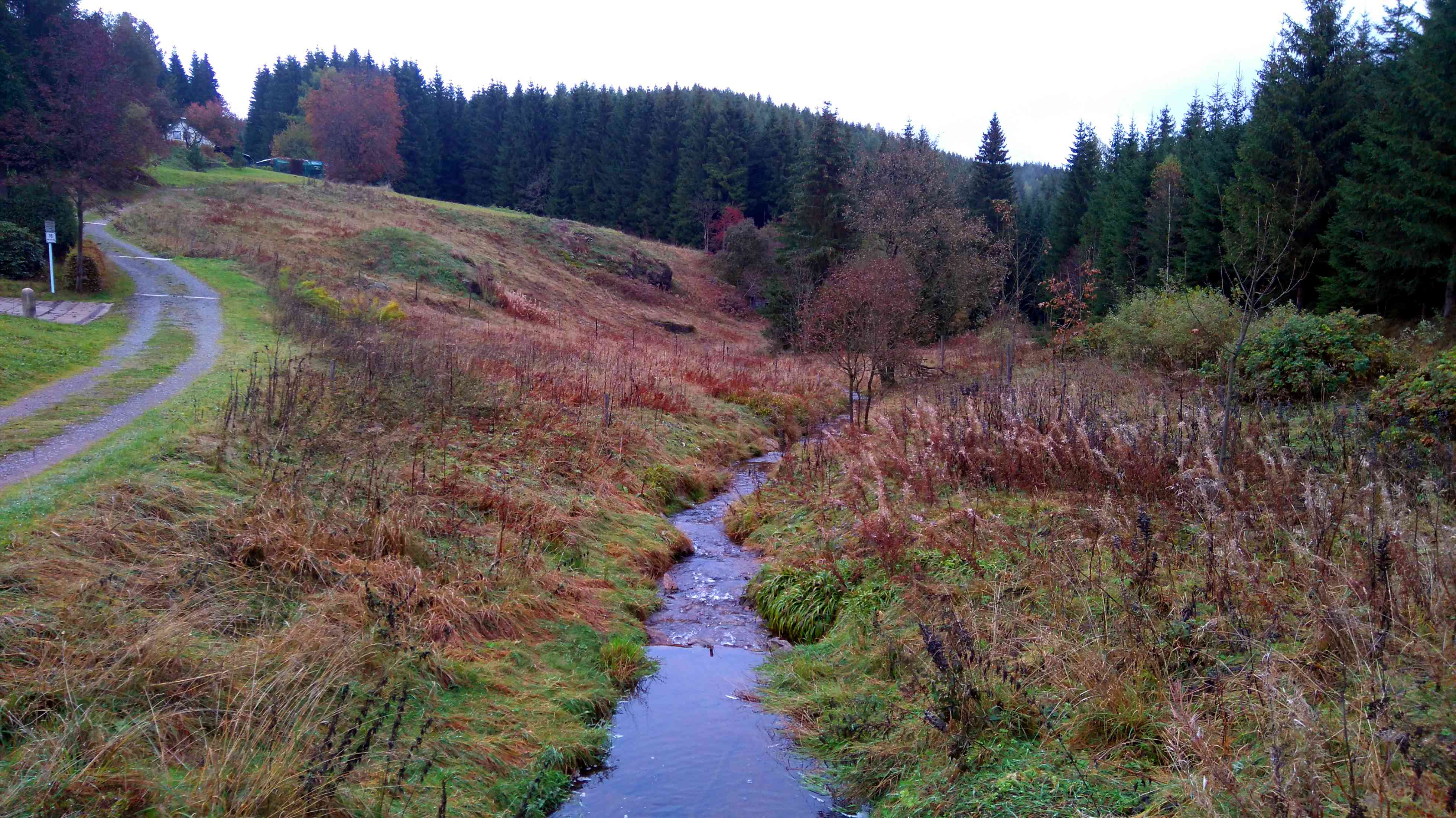 Blick in den Lehmergrund